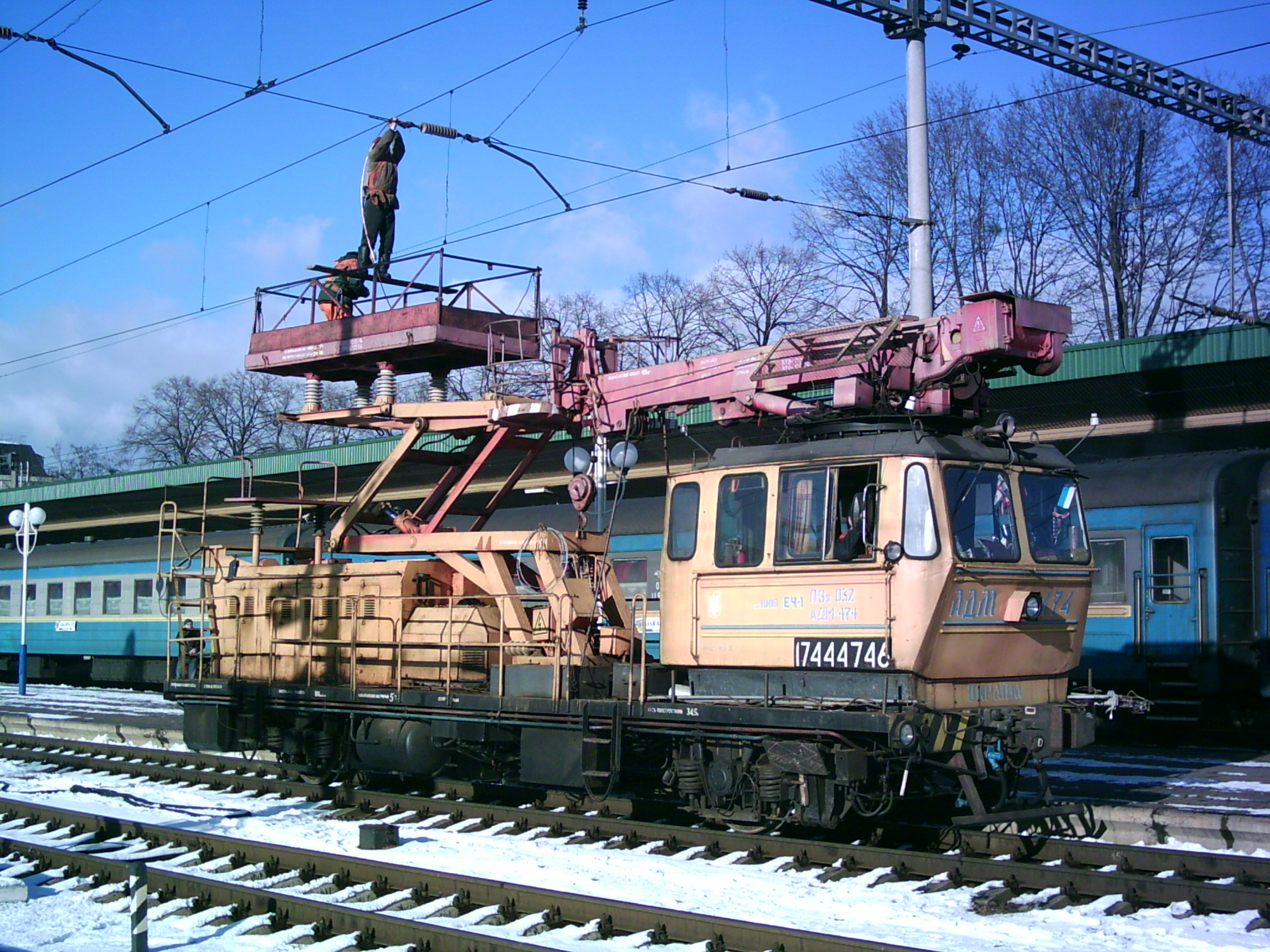 Ремонт_контактной_сети ,Автомоториса АДМ-1